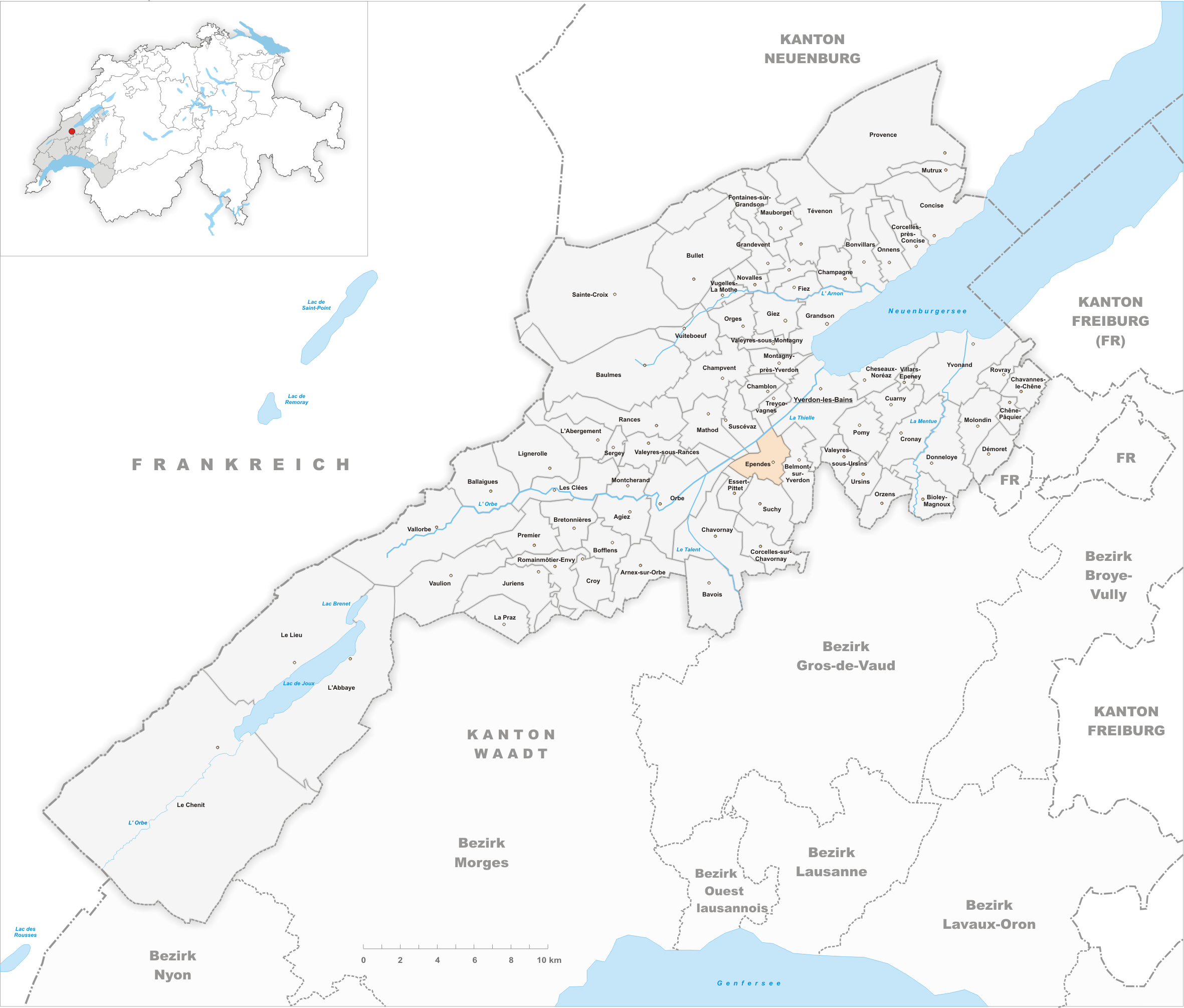 Municipality Ependes